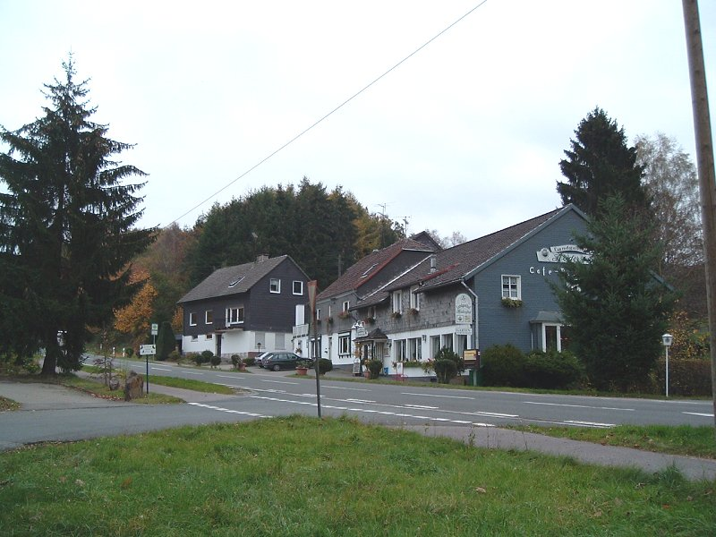 Heidersteg in Radevormwald Fotografiert von Benutzer:Taube Nuss im Oktober 2004 "Lizenz: GNU FDL"